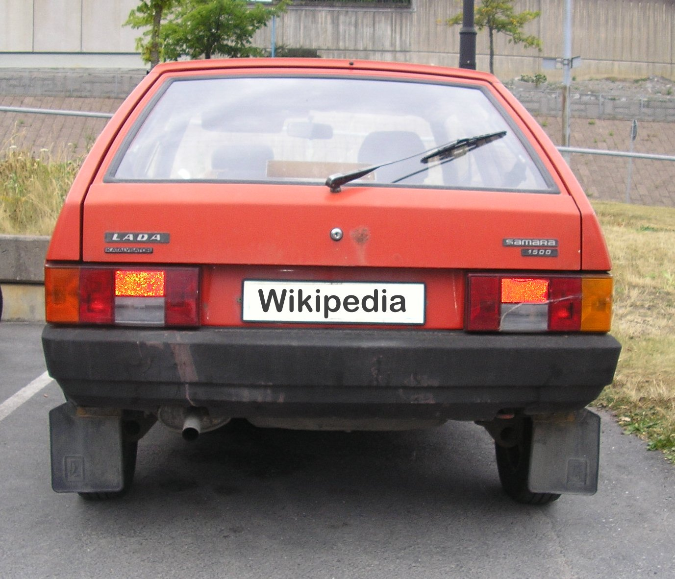 A 1988 Lada Samara 2108-1,5 210